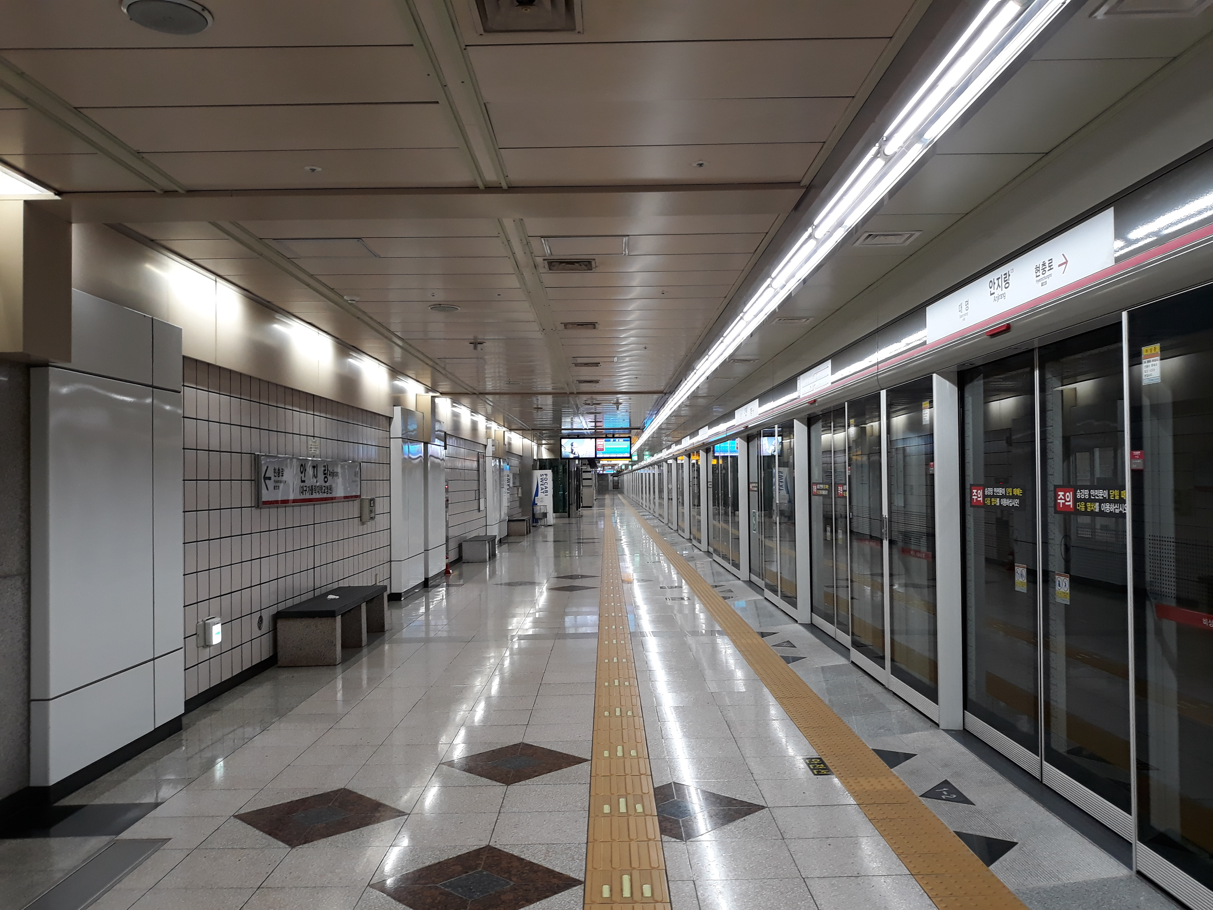 대구 도시철도 1호선 안지랑역 안심 방면 승강장